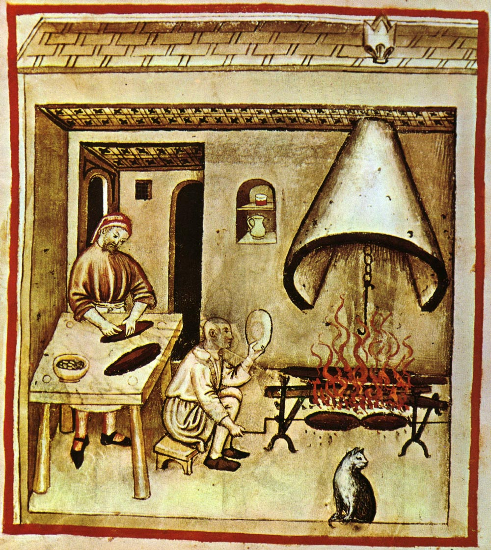 Tacuina sanitatis (XIV century)